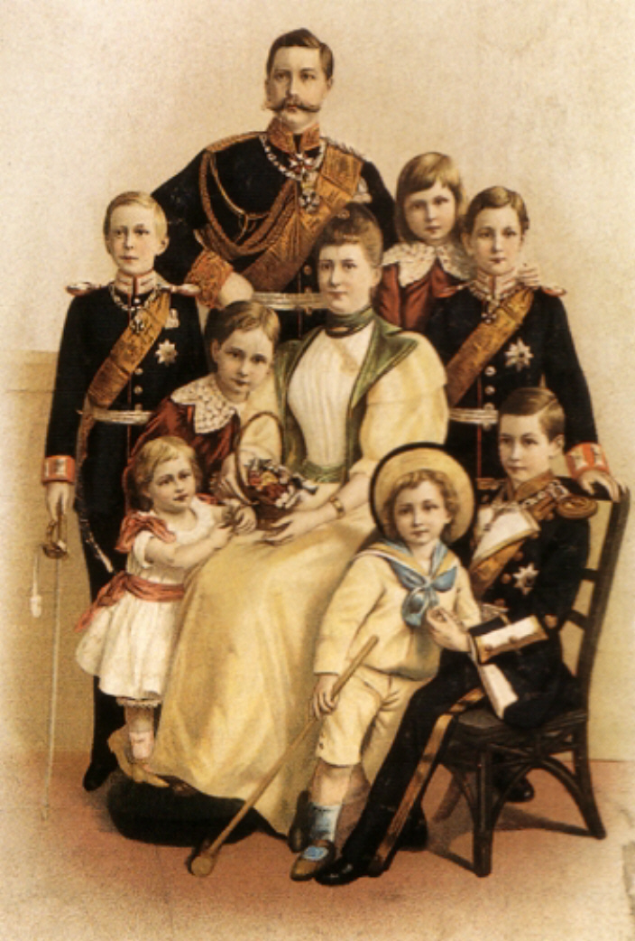 Kaiser Wilhelm II, Familie